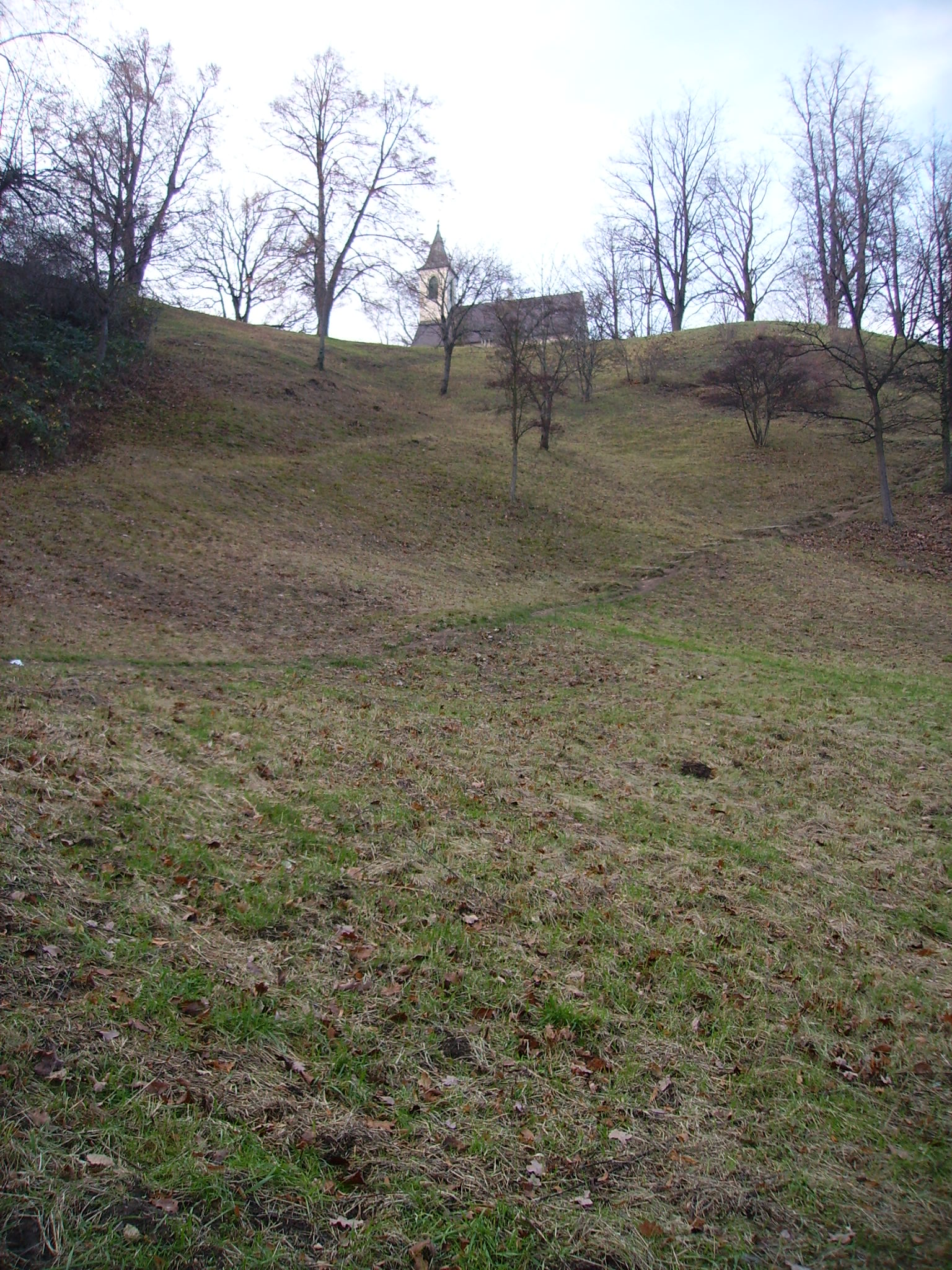 Bautzen - Der Hang des Protschenberges. Hier findet das traditionelle Ostereierschieben statt.